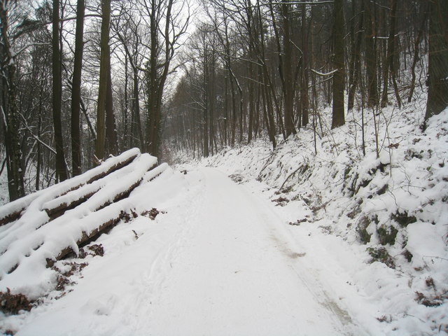 Waldweg beim Meisental